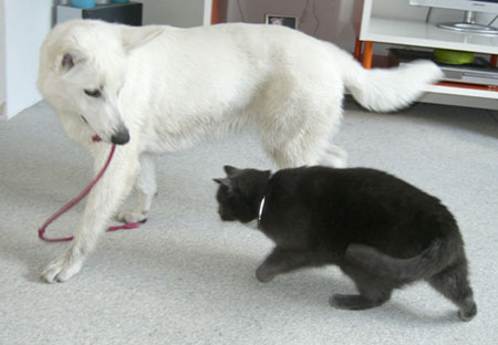 Zelfgemaakte foto